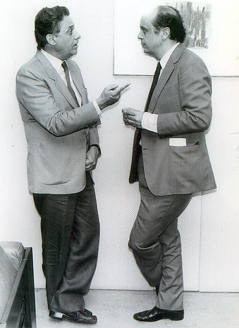 O senador Fernando Henrique Cardoso com o deputado federal José Serra durante a Assembleia Constituinte.